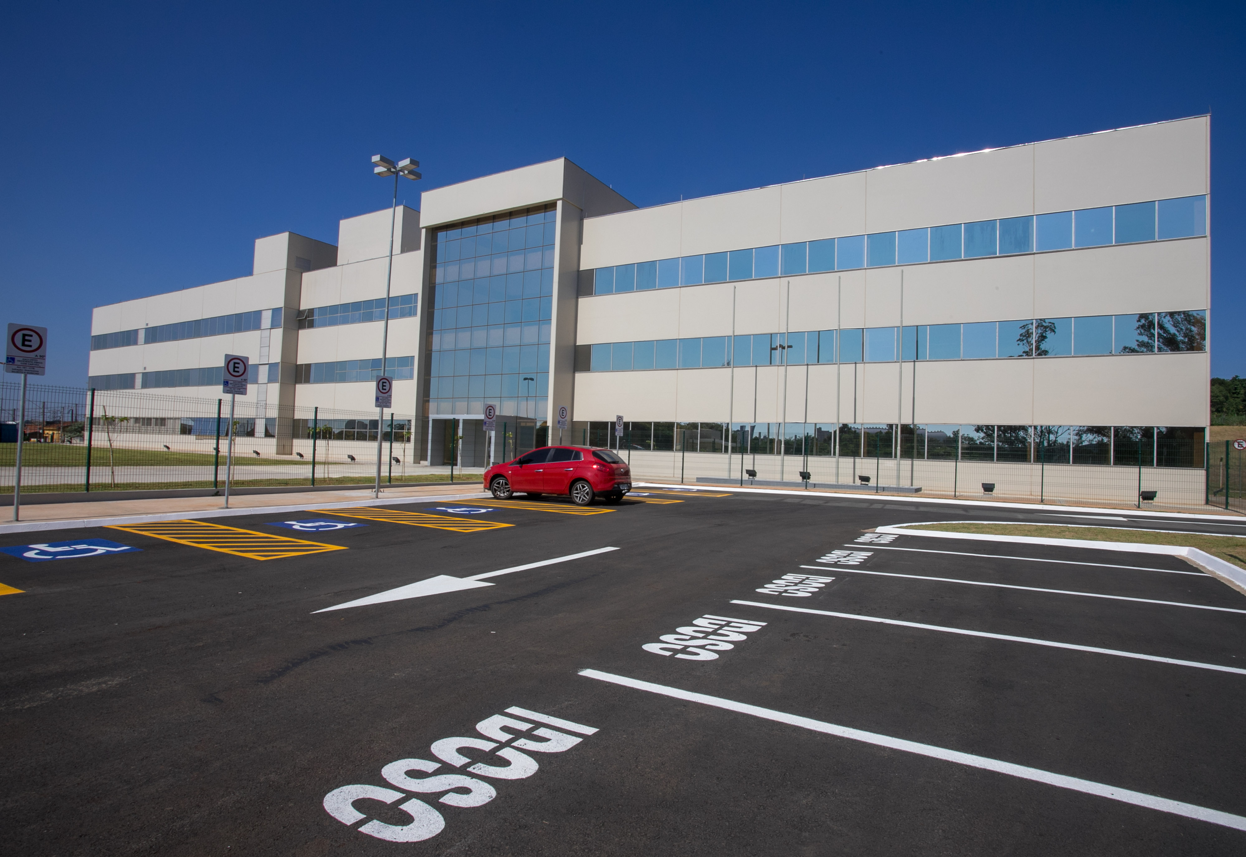 O Governador do Estado de São Paulo, Geraldo Alckmin, durant inauguração do Fórum de Limeira. Local: Limeira/SP. Data: 12/03/2018 Foto: Governo do Estado de São Paulo